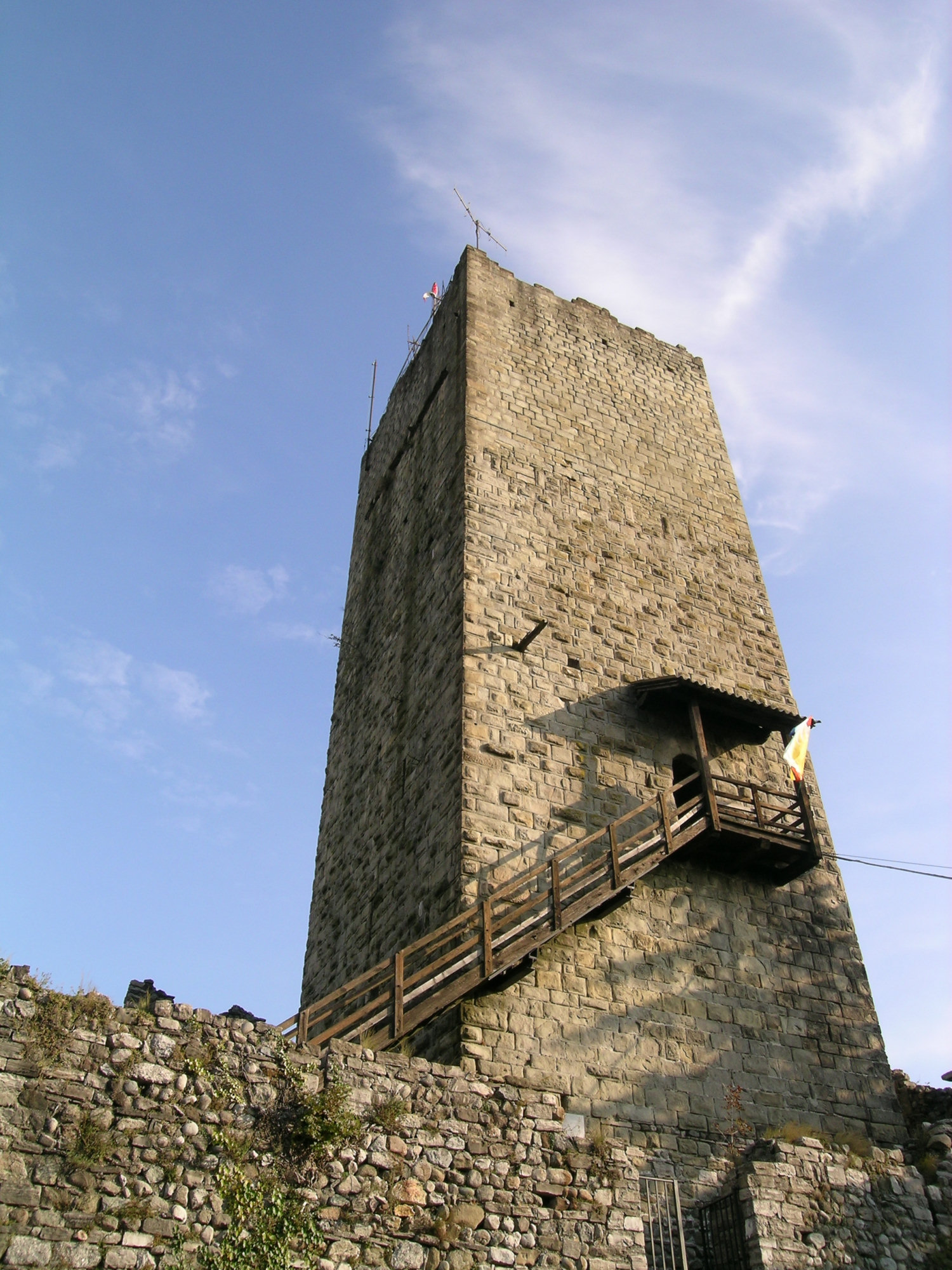 Autore: Giovanni Bianchi, scattata il 28 ottobre 2007, foto del Castel Baradello